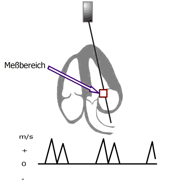 PWD-Entstehung, schematisch